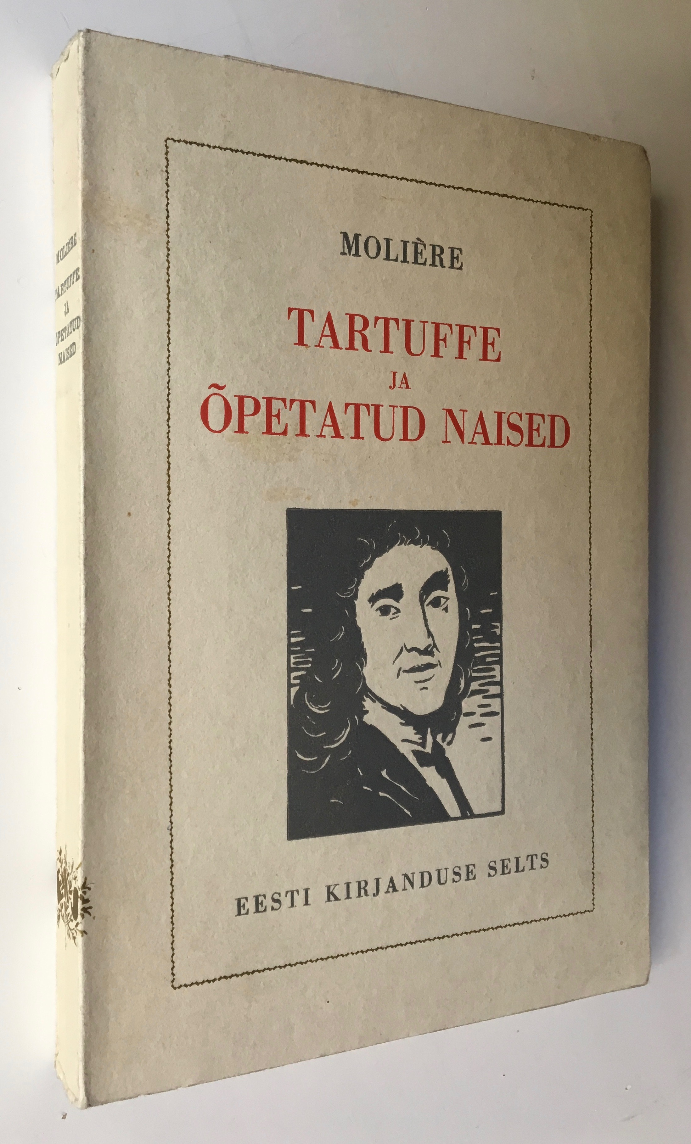 Pehme köide